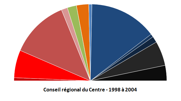 Conseil régional du Centre en 1998